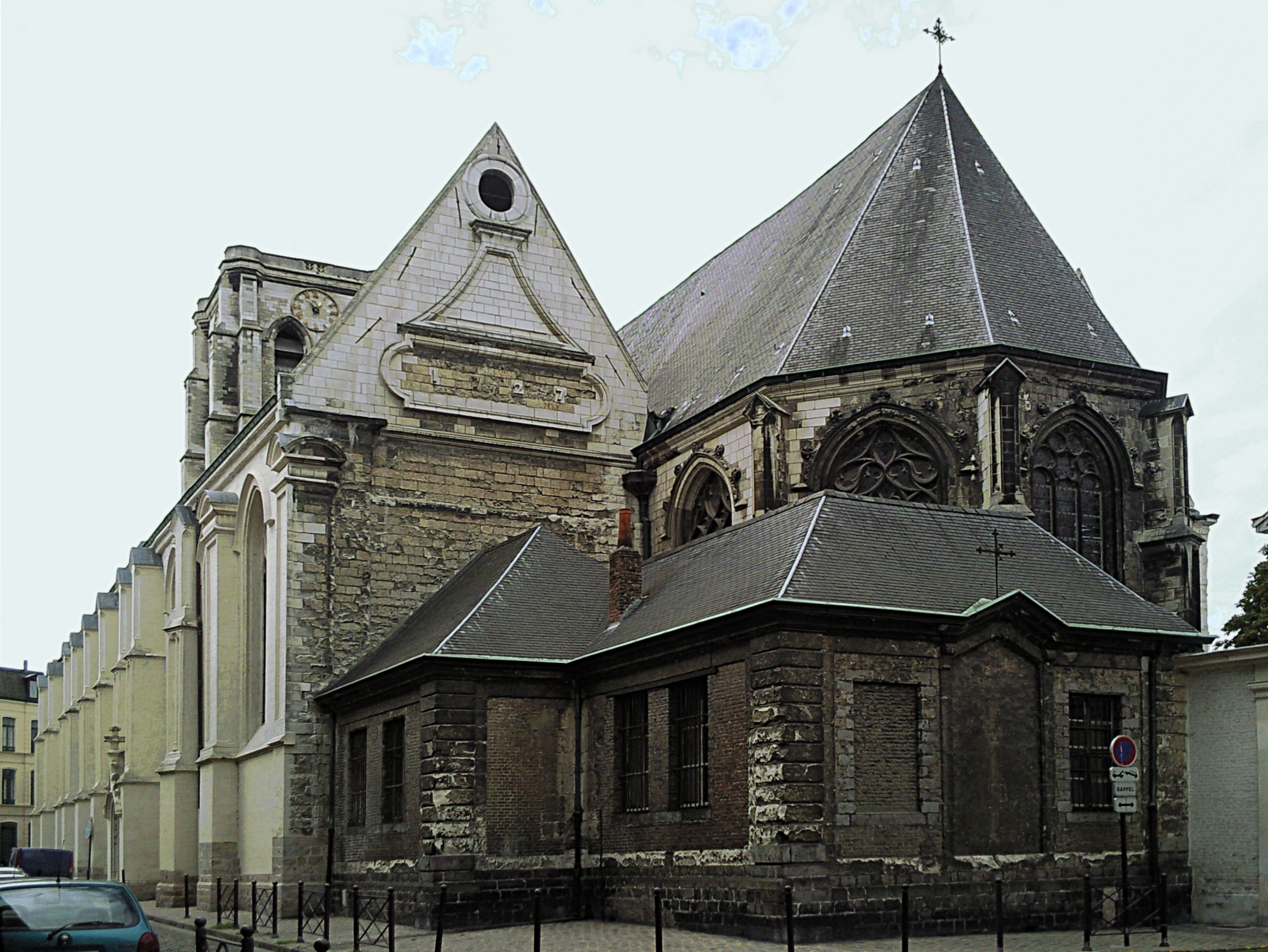 Vue arrière de l'église Sainte-Catherine à Lille (Nord).